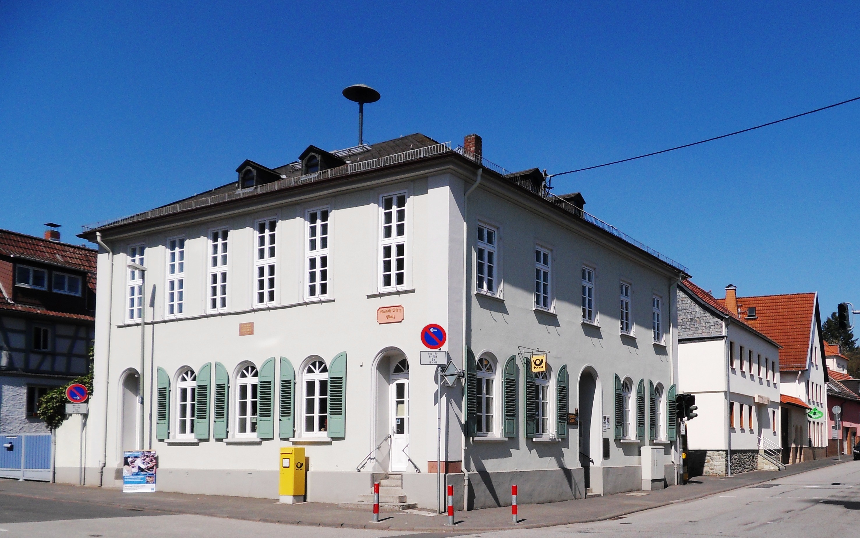 Rathaus in Wiesbaden-Naurod, Fondetter Straße, Sitz der Ortsverwaltung und Geburtshaus des Heimatdichters Rudolf Dietz. Blick von Süden.